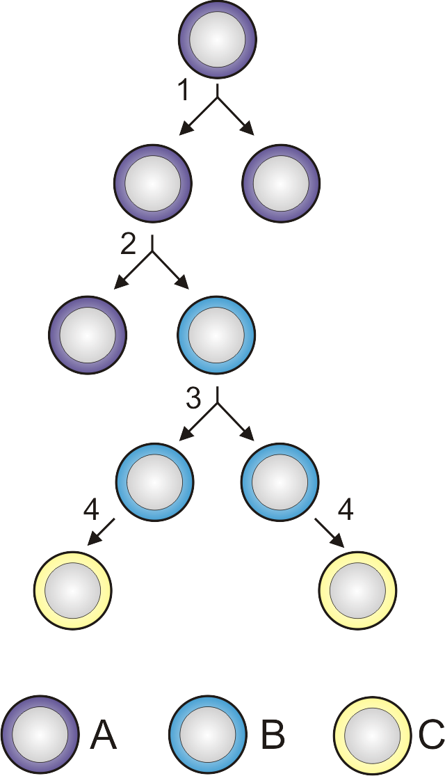 Stem cell division and differentiation